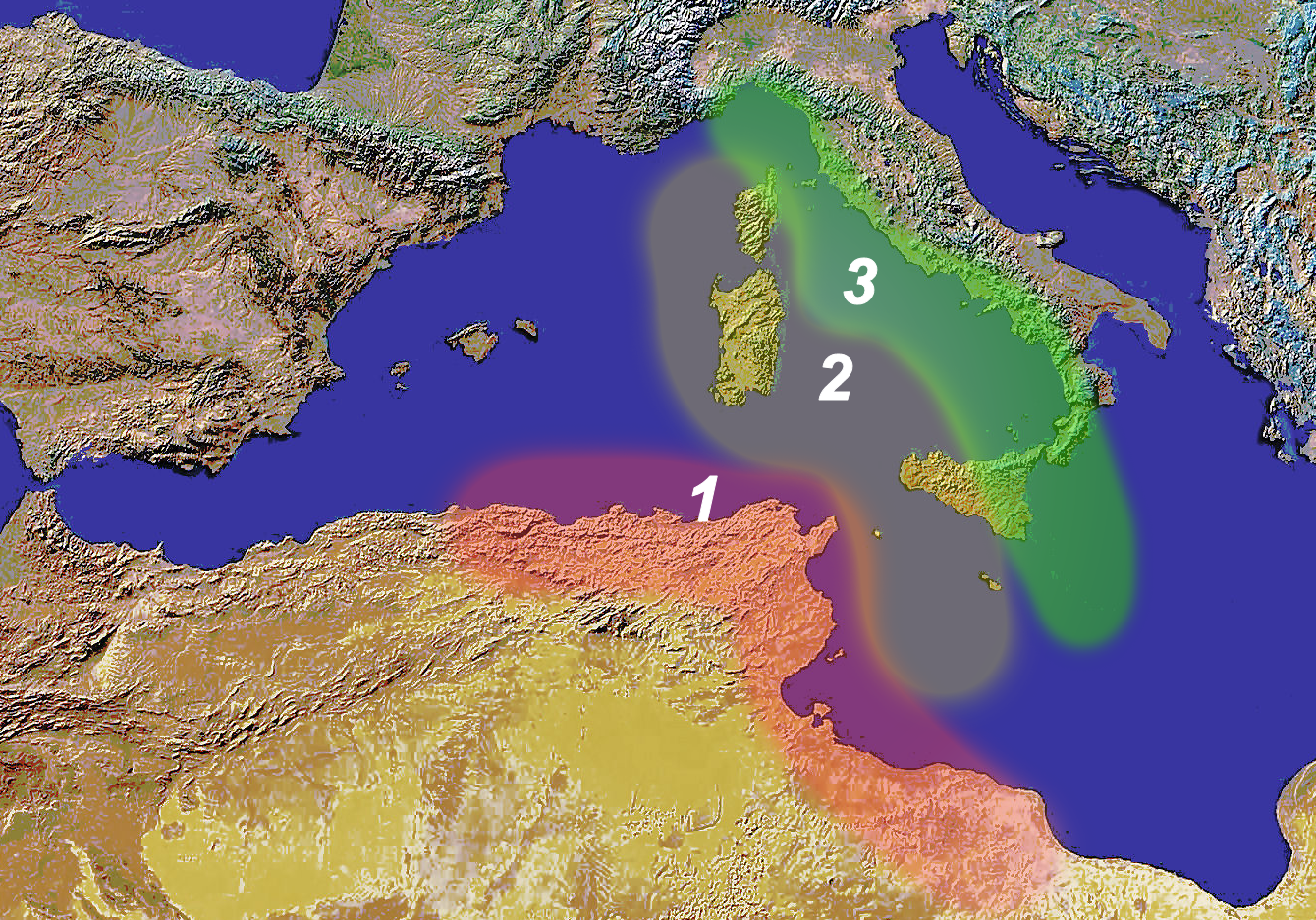 Commercial and navigation limits stated in Rome-Carthago treaty of 509 BC. Limiti commerciali del trattato Roma-Cartagine del 509 a.C.